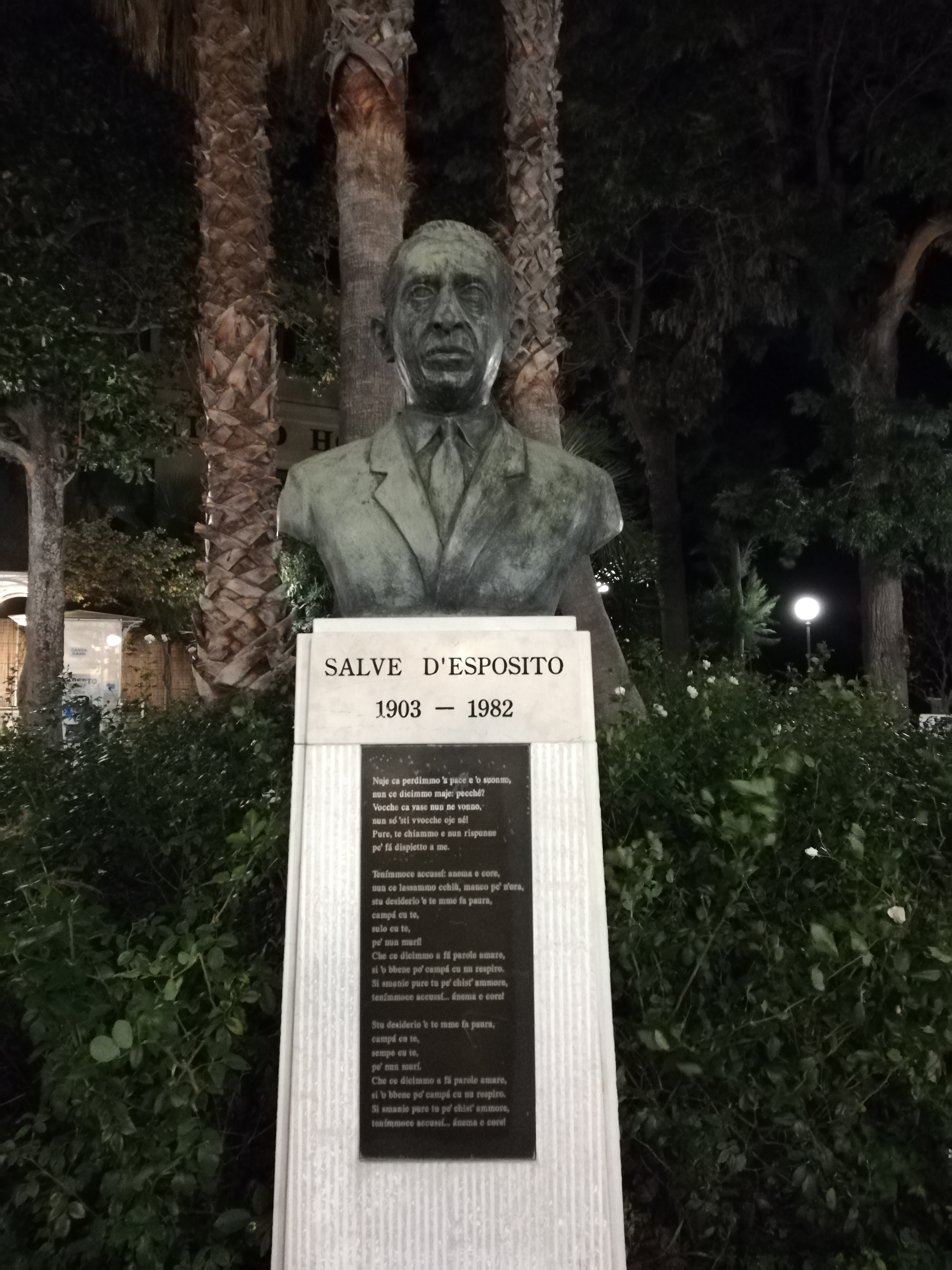 Busto dedicato a Salve D'Esposito a Sorrento